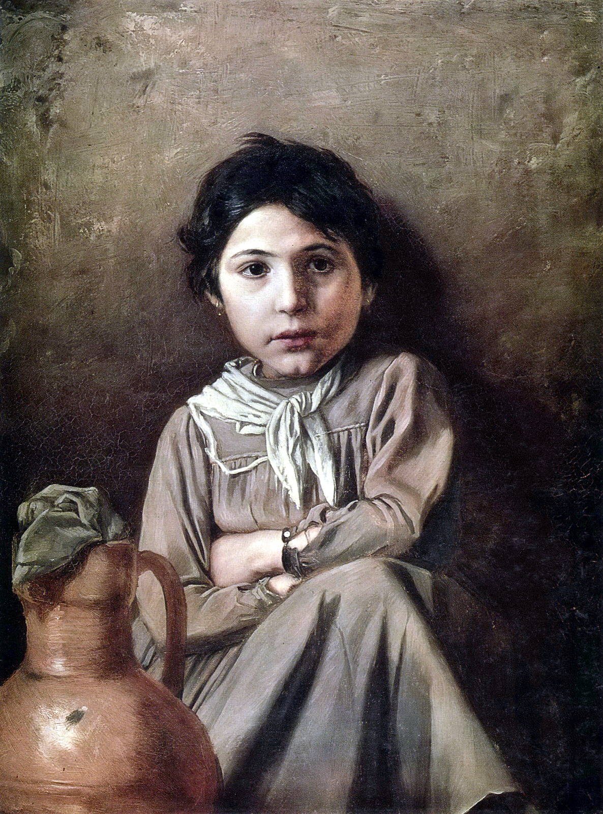 Девушка с кувшином